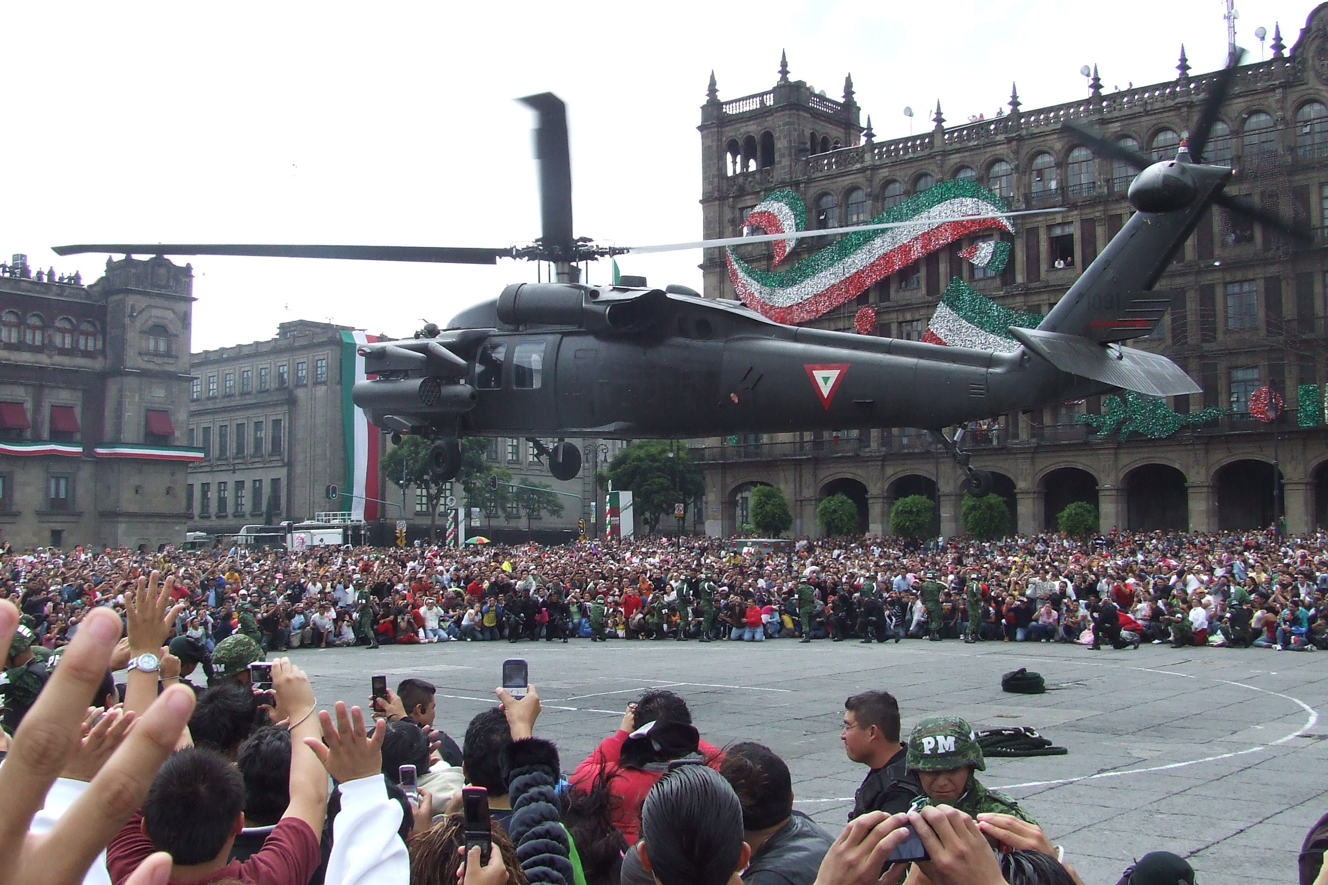 UH-60 Black Hawk fotografiádo después del desfile militar del 15 de septiembre de 2009 en la ciudad de méxico